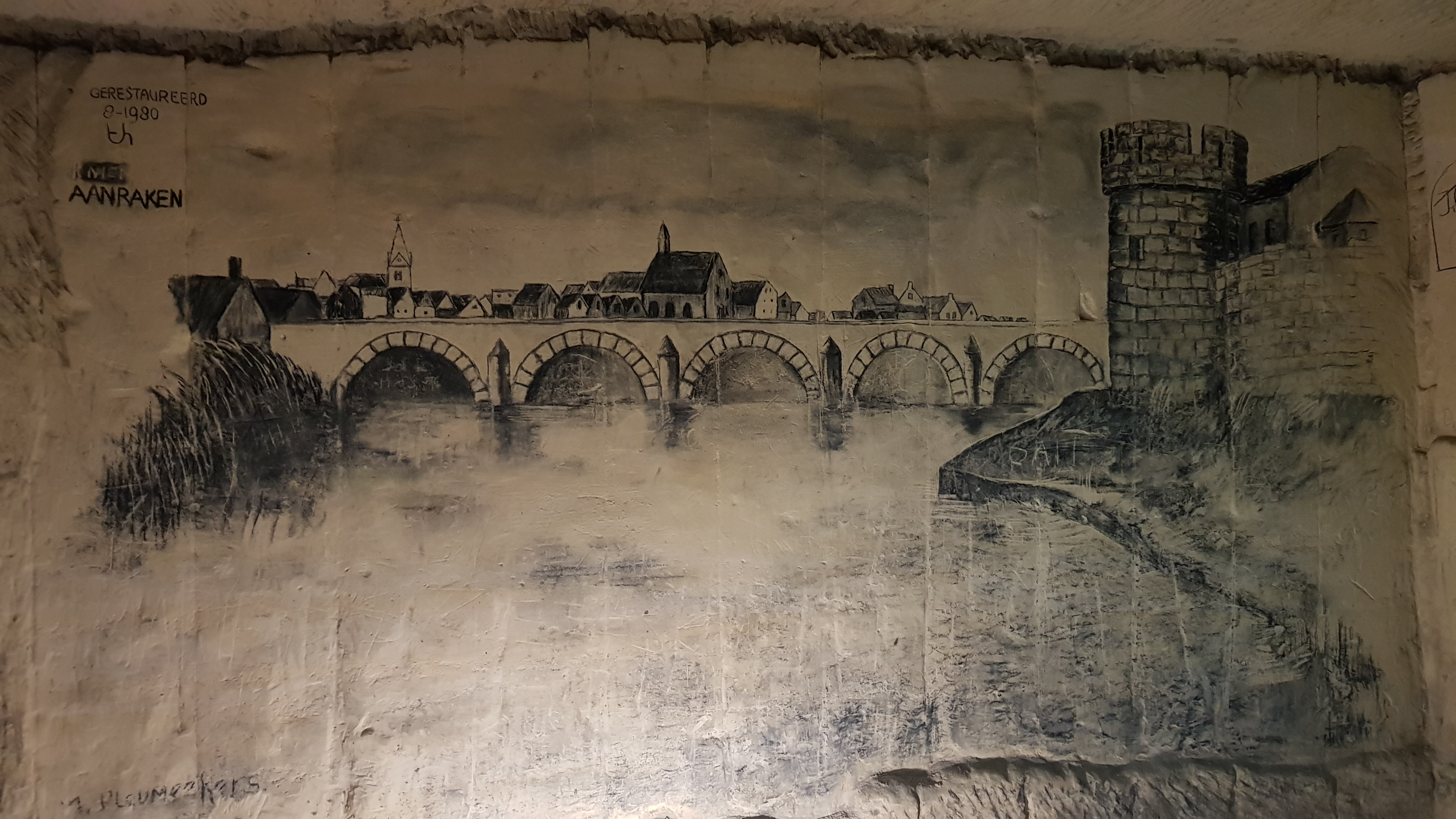 Noordelijk Gangenstelsel in de Sint-Pietersberg, Maastricht, Nederland